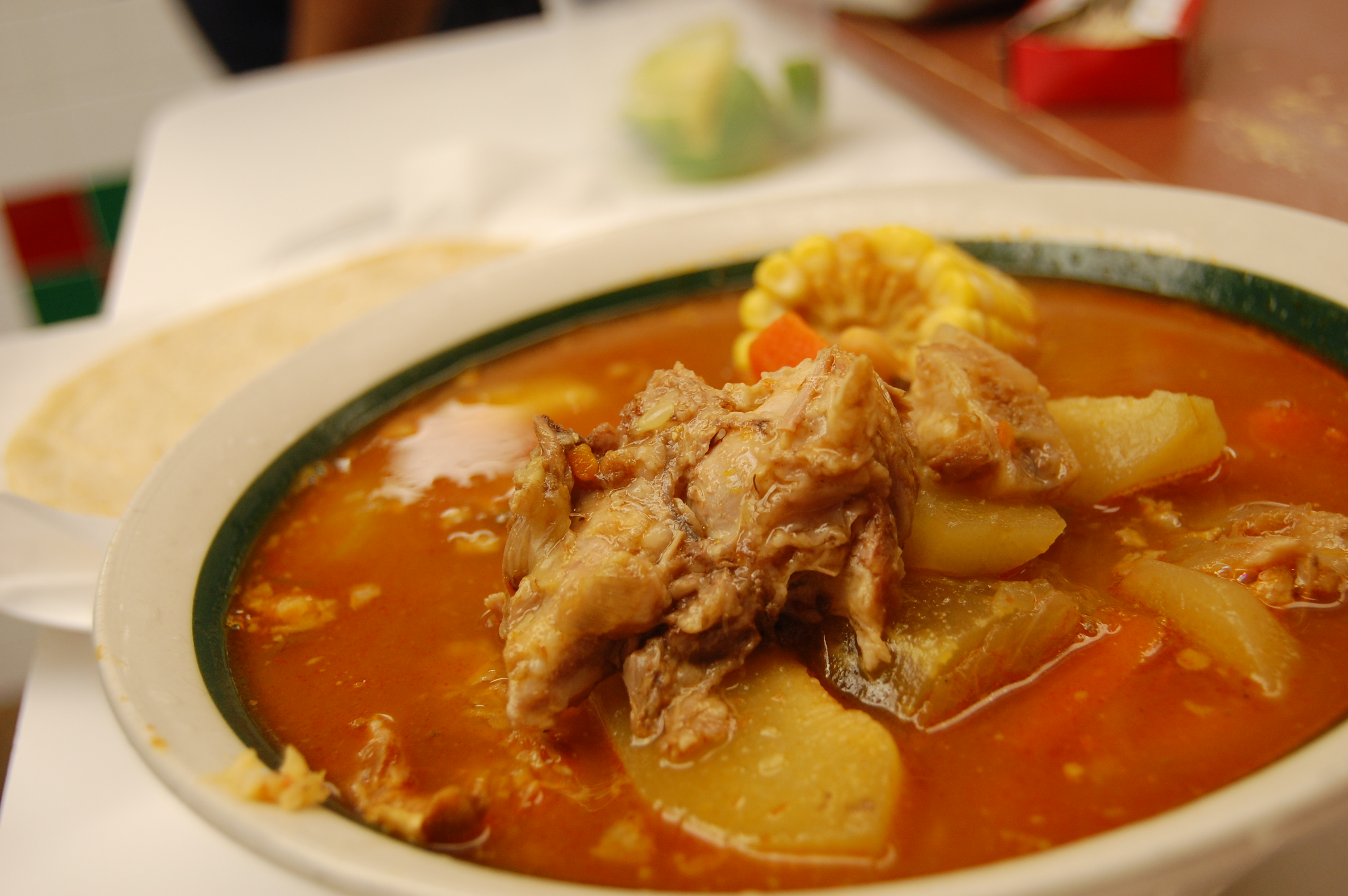 Mole de olla, platillo de comida mexicana.